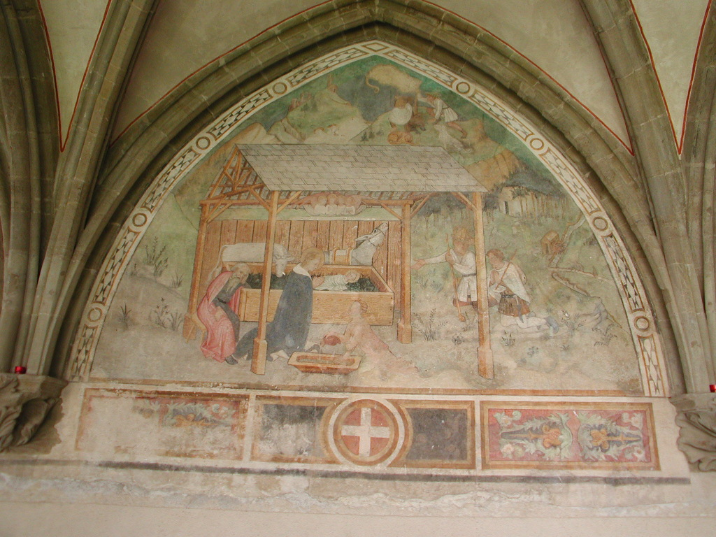 Abbaye d'Abondance, le cloître